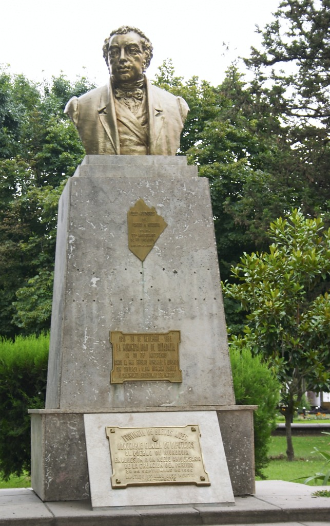 Busto de de Bernardino Rivadavia en América, Rivadavia, Buenos Aires, Argentina